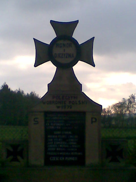 Cmentarz w Gdowie